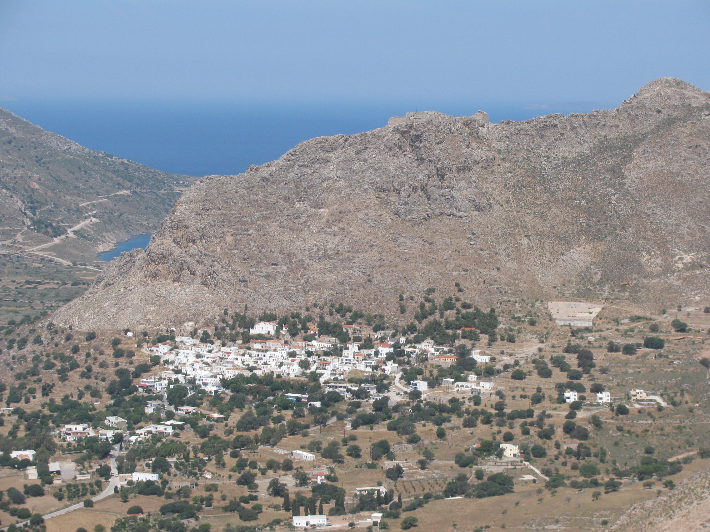 Μεγαλο χωριο